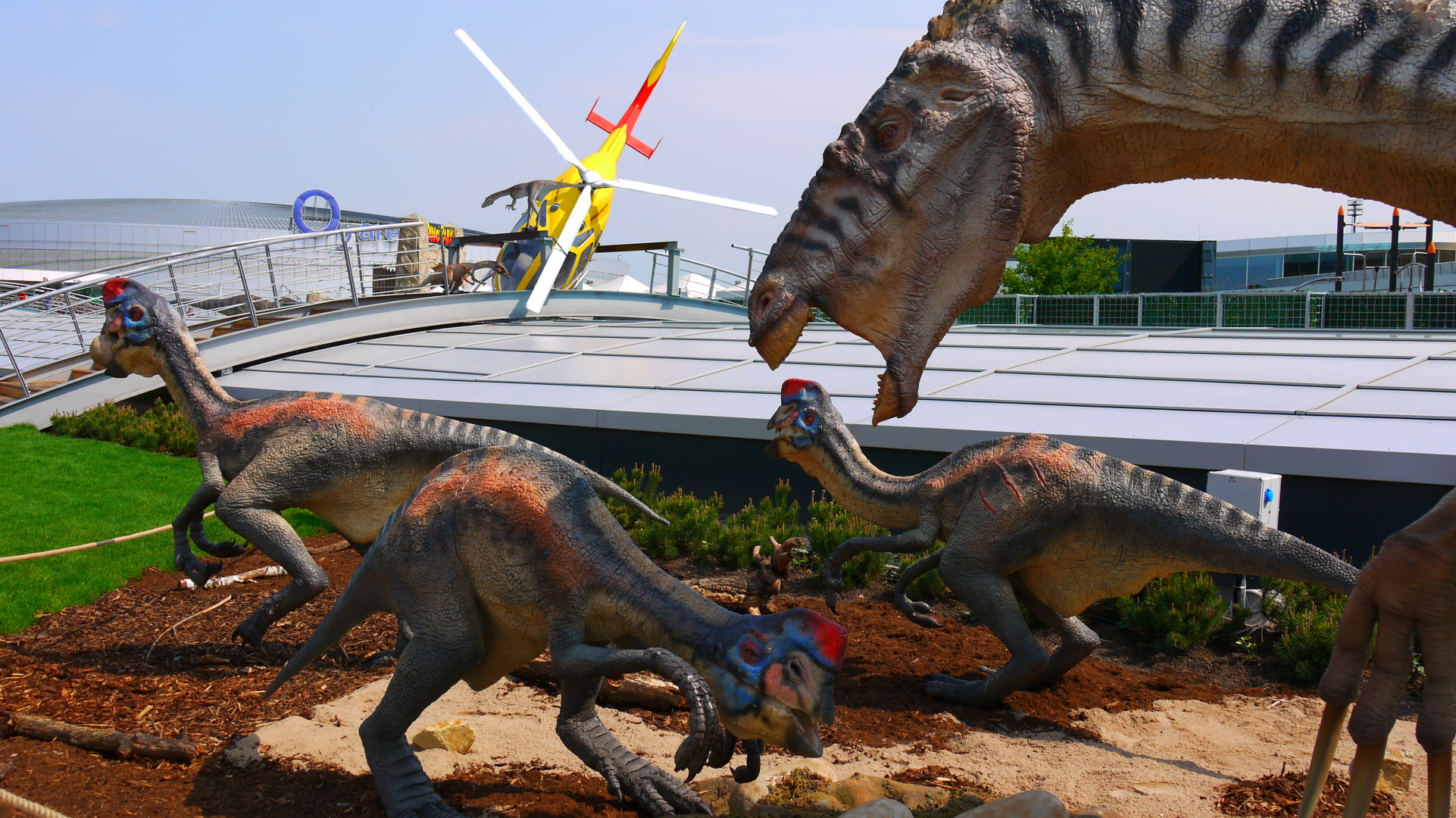 Segnosaurus, DinoPark Praha